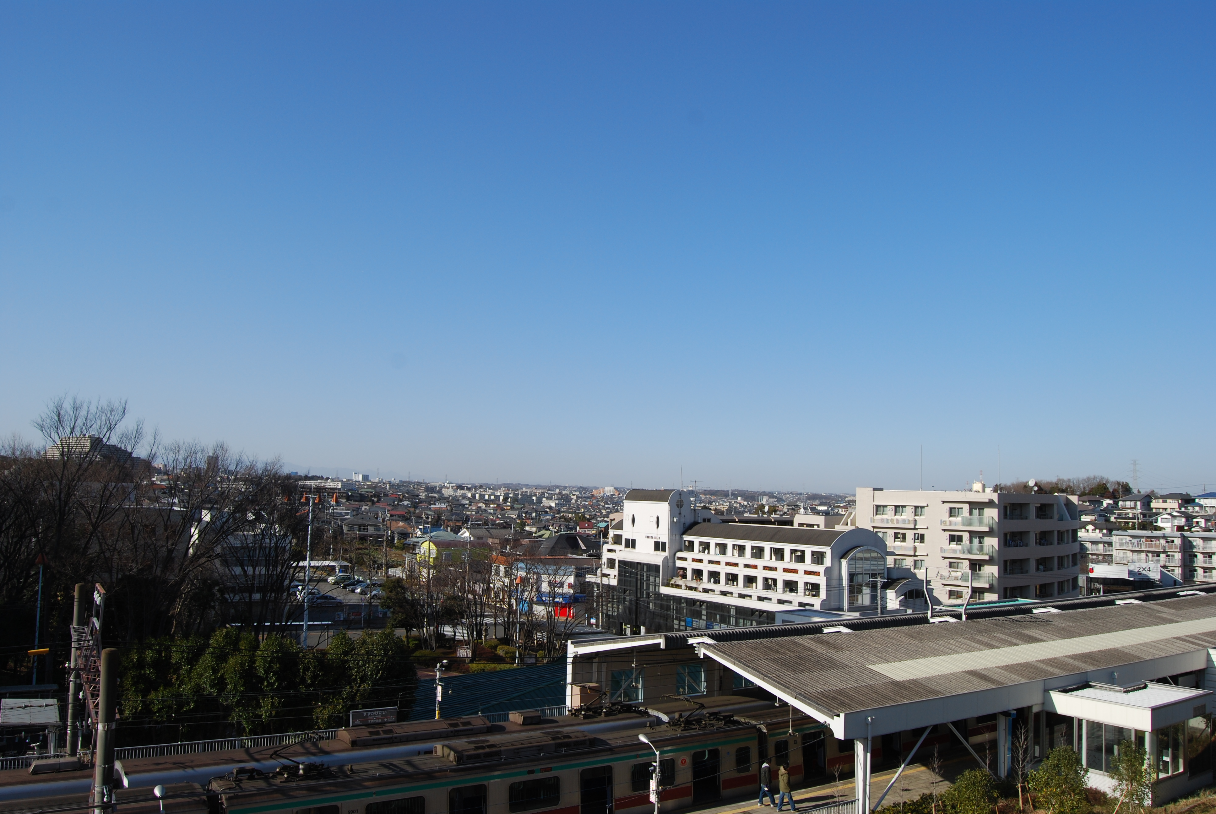 すずかけ台駅 周辺の街並み